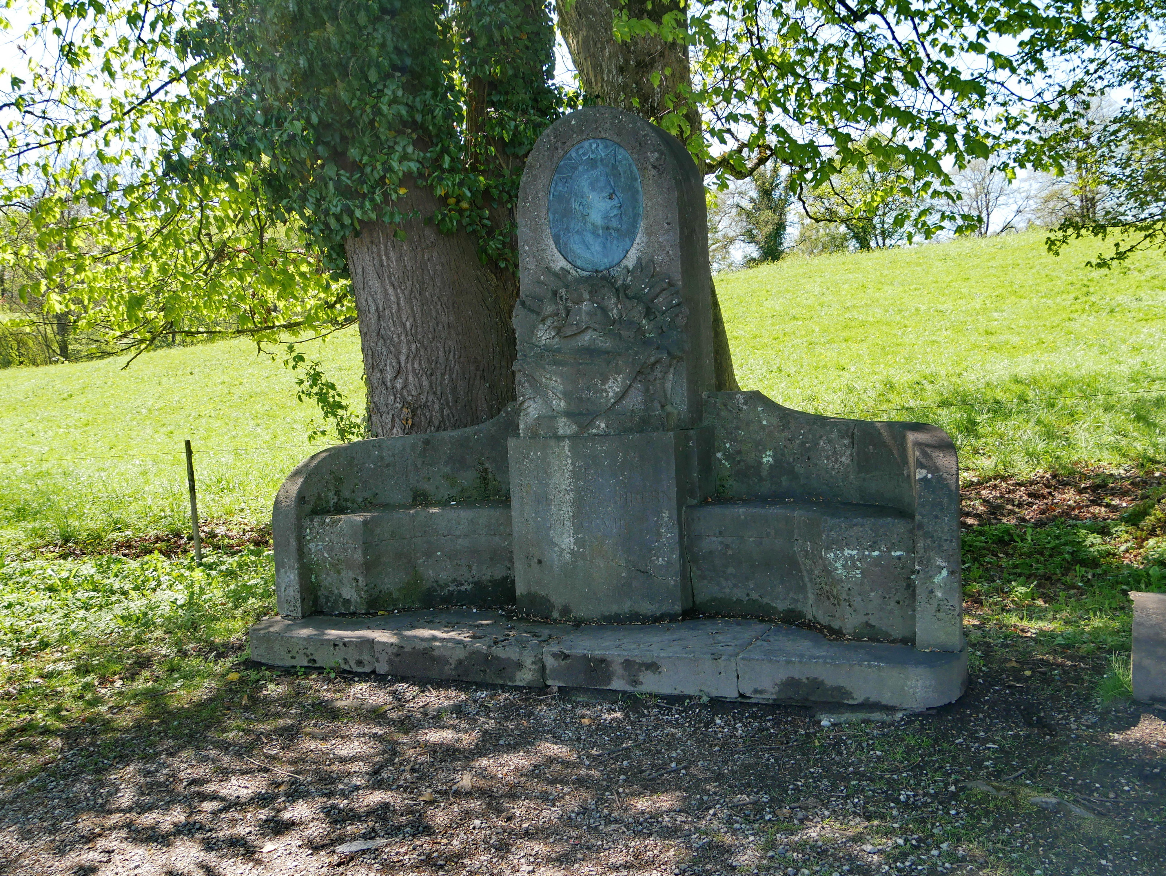 Bernried am Starnberger See, Lindenallee 1: Denkmal für den Schriftsteller Karl Tanera aus dem Jahr 1908 in Form einer steinernen Sitzbank, welche durch die eigentliche Denkmalsäule zweigeteilt wird. In der Denkmalsäule befindet sich oben eine Metallplatte mit dem Portrait Karl Taneras (mit eingesetztem Zwicker-Glas aus Metall) sowie der Inschrift TANERA, unten die Widmung (s. Bild 002)